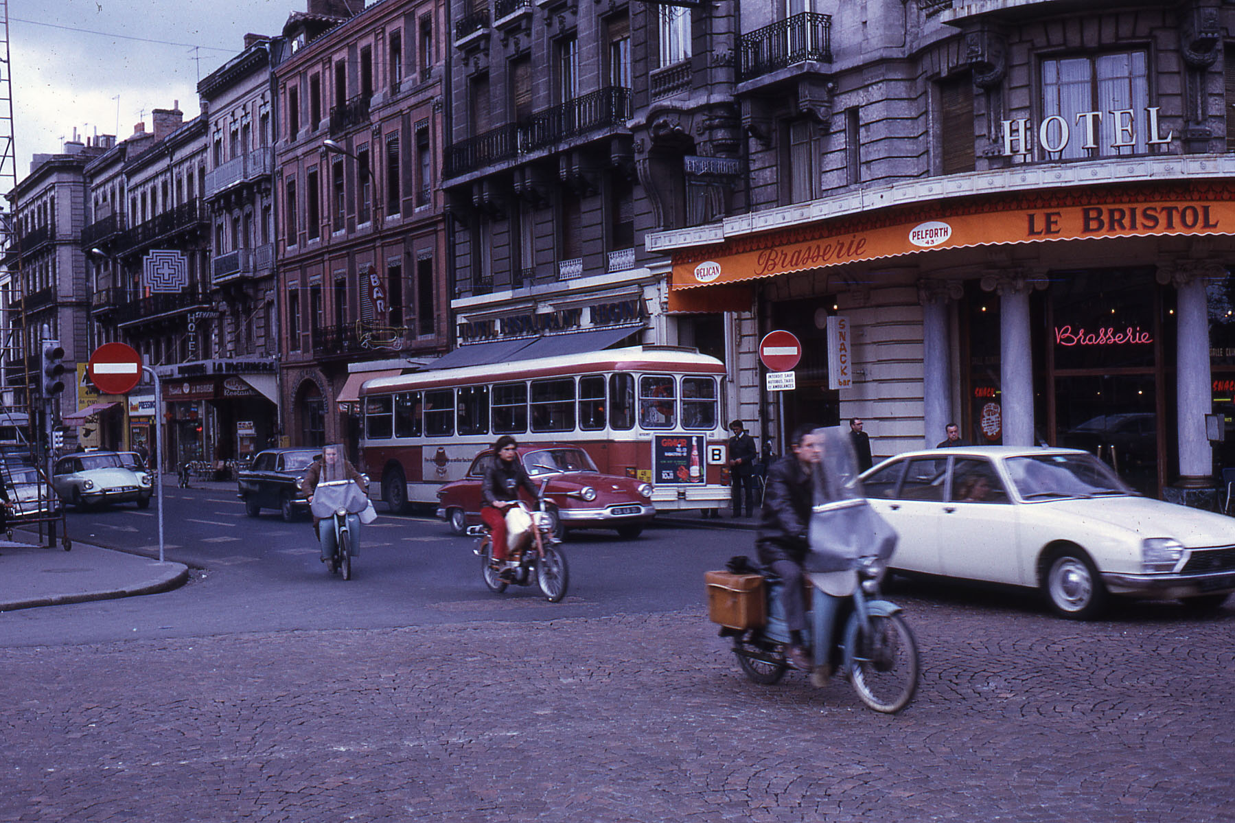 Circulation rue de Bayard à Toulouse (Haute-Garonne, France).